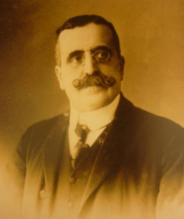 Político reformista español de principios del siglo XX.